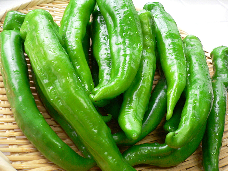 ざるの直径27cm（This ”Zaru” is twentyseven centimeters in diameter.）